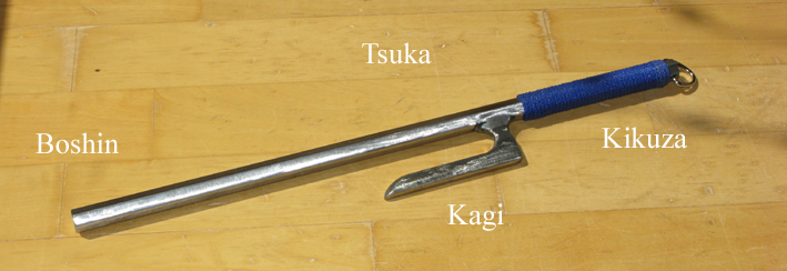 Japanilainen rautapamppu Jutte / japanese iron truncheon